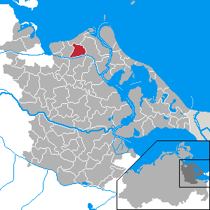 Wusterhusen, Landkreis Ostvorpommern, Mecklenburg-Vorpommern